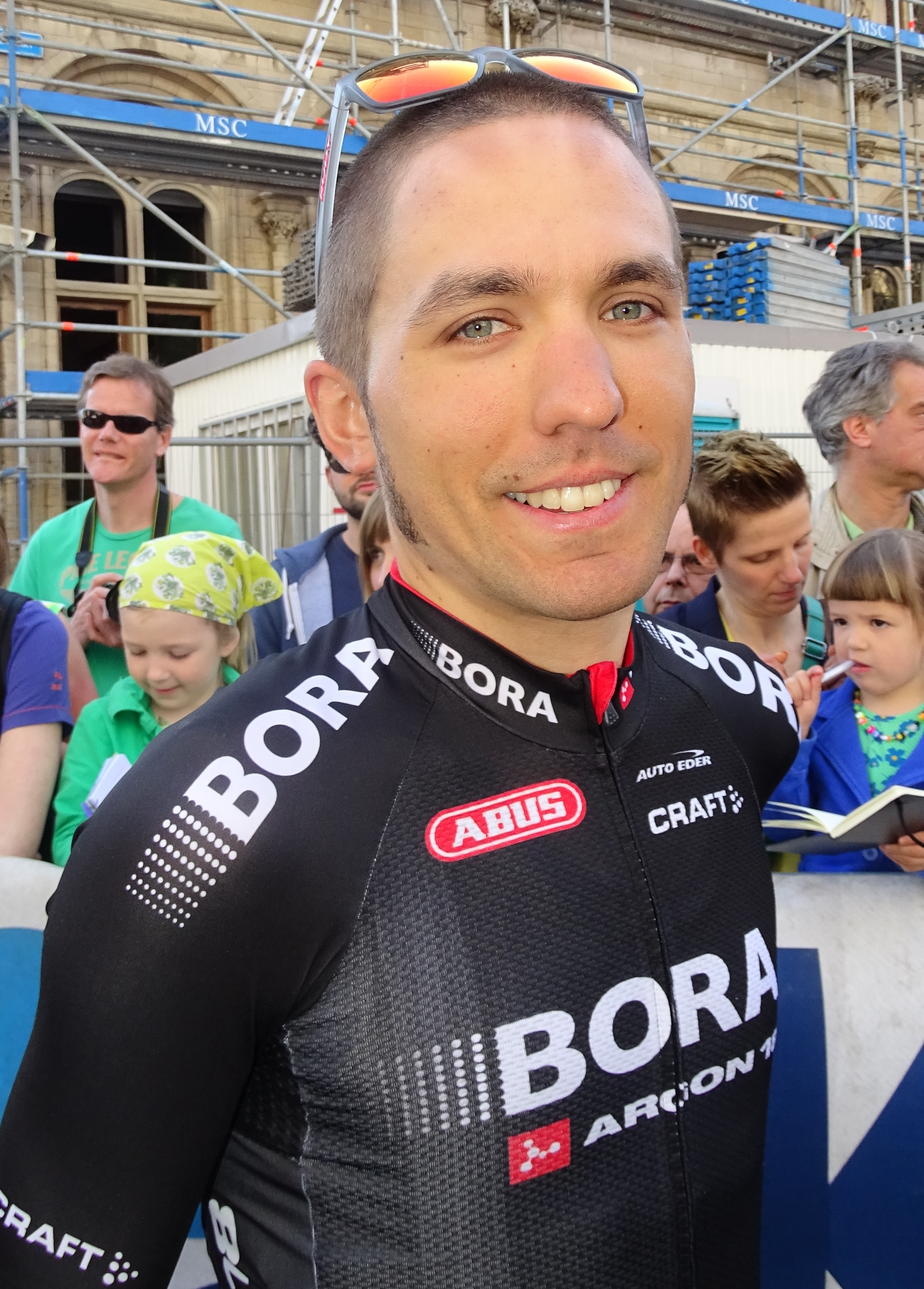 Reportage réalisé le mercredi 15 avril à l'occasion du départ de la Flèche brabançonne 2015 à Louvain, Belgique.